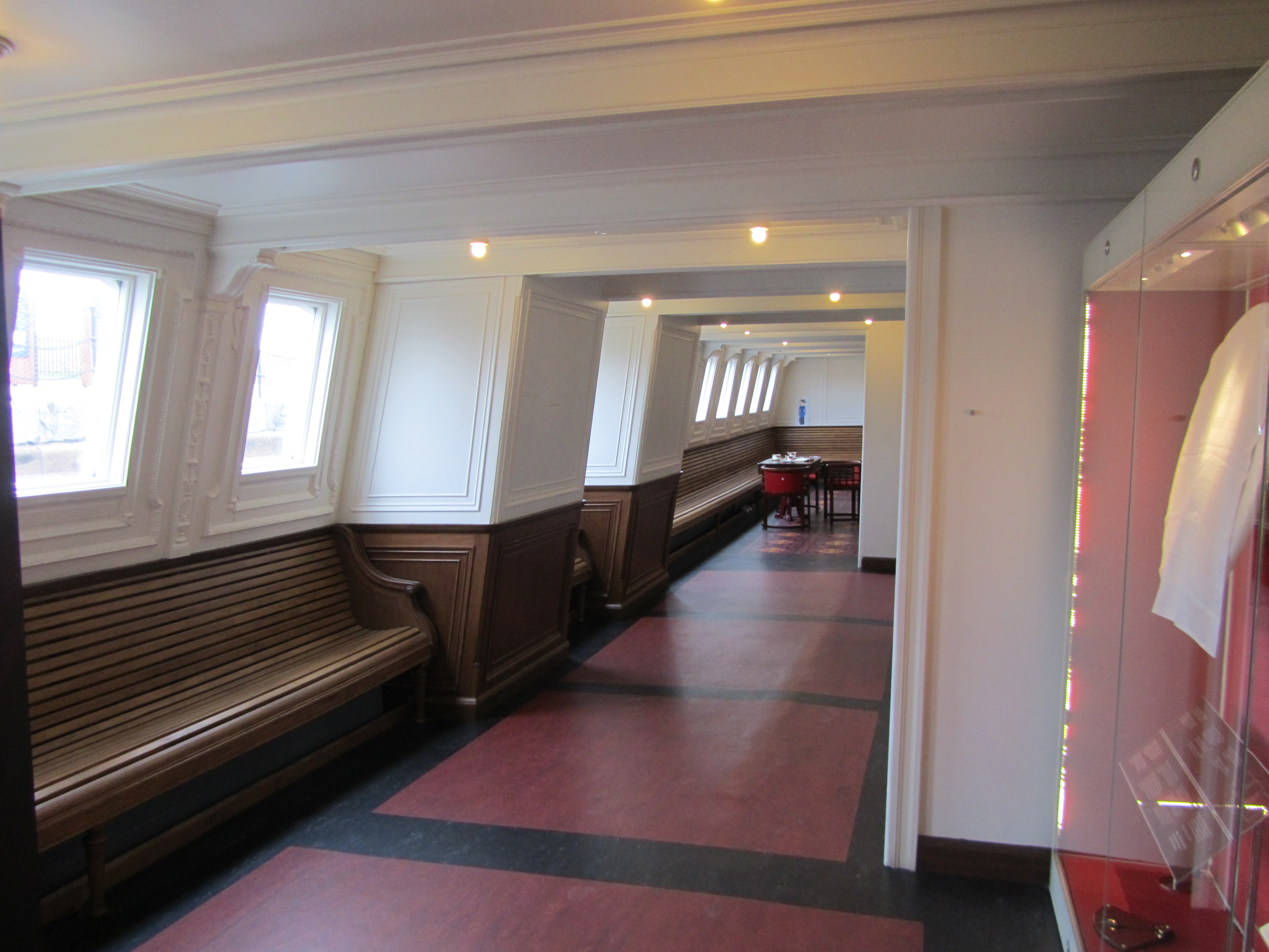 Reconstitution de l'intérieur du SS Nomadic. Ici la coursive séparant les espaces ouverts de première et deuxième classe.